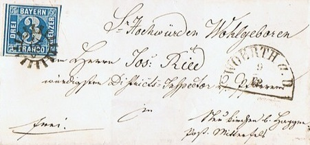 Blauer Dreier 3 Kreuzer Franco Bayern Mühlradstempel Wörth Donau